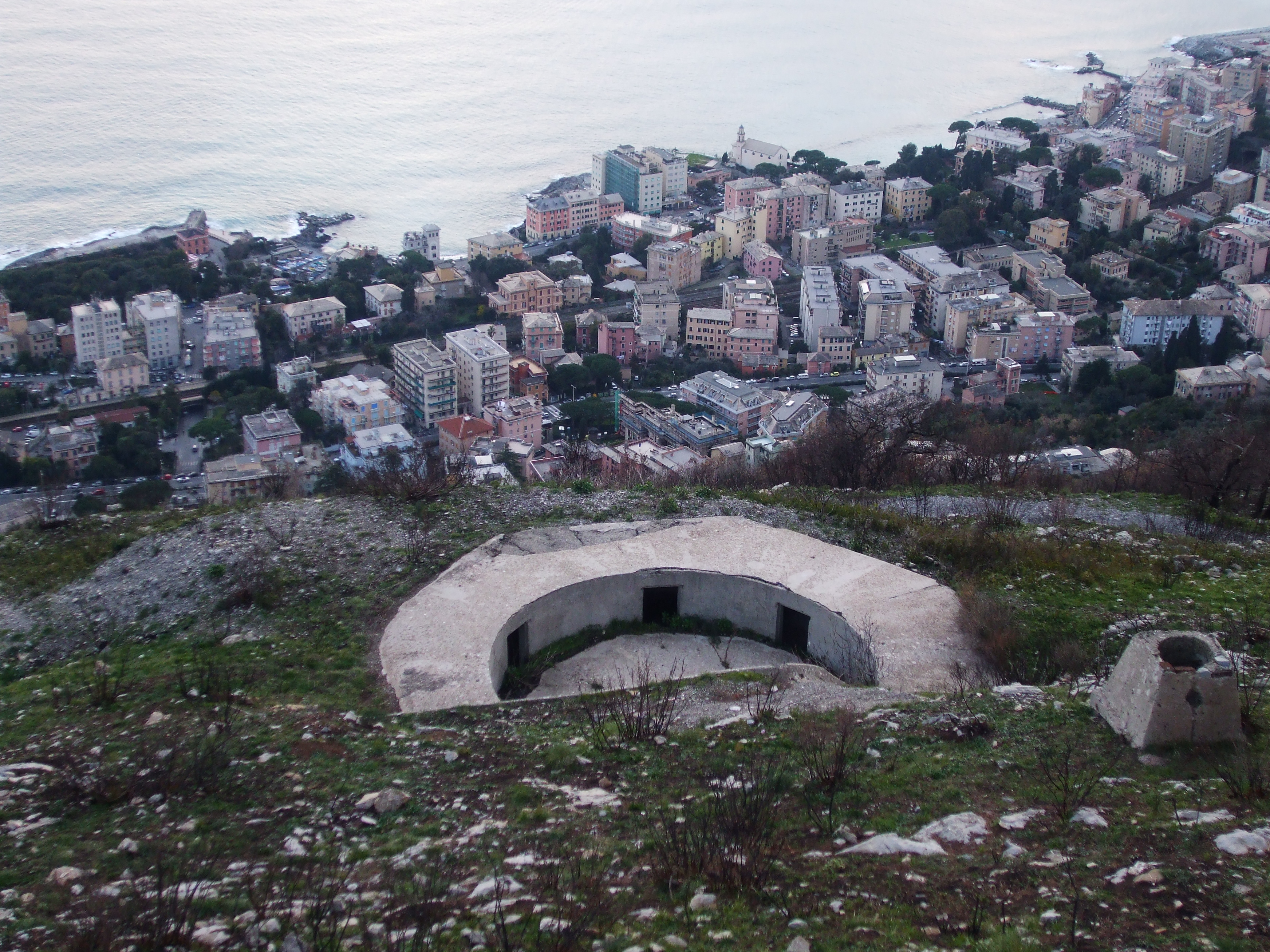 Postazione antiaerea delle batterie Alte di Monte Moro